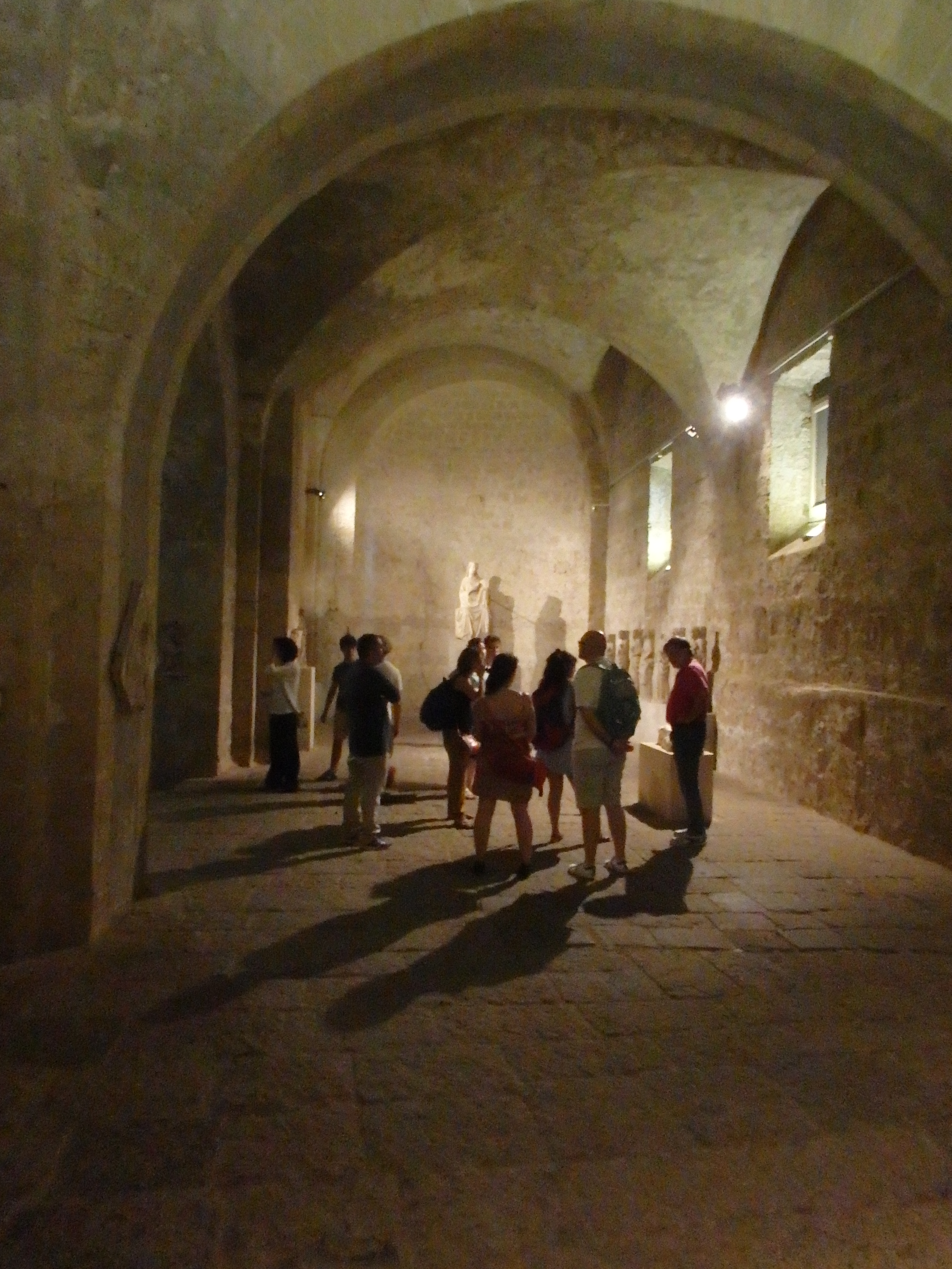 Viste dal Vomero, Napoli.